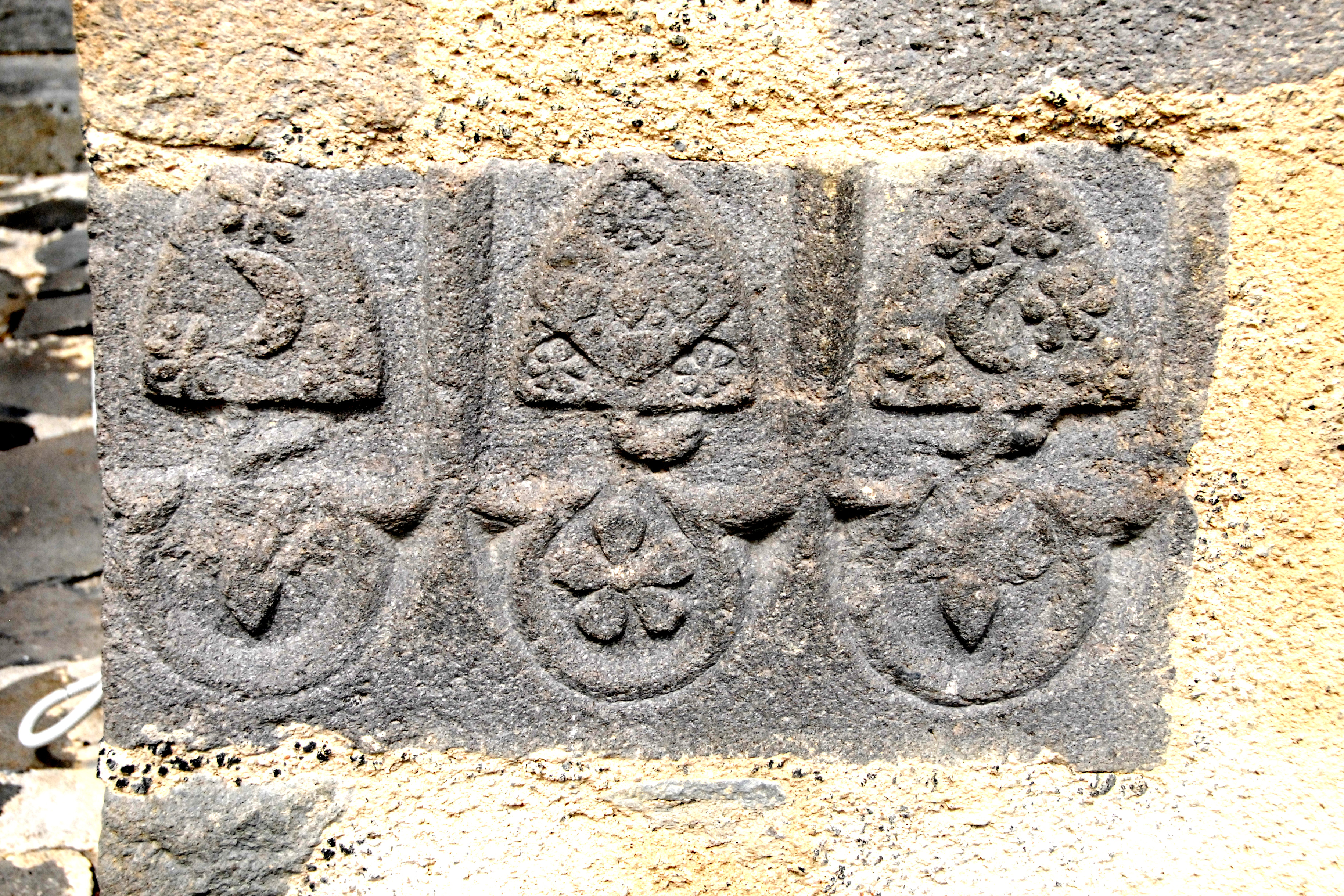 St.-Nectaire, Monolith mit Relief